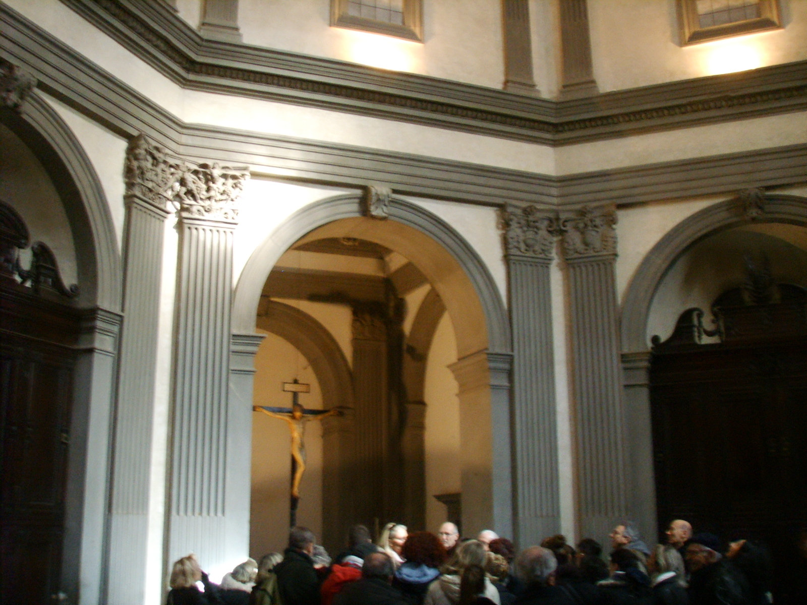 Santo Spirito, sagrestia di giuliano da sangallo